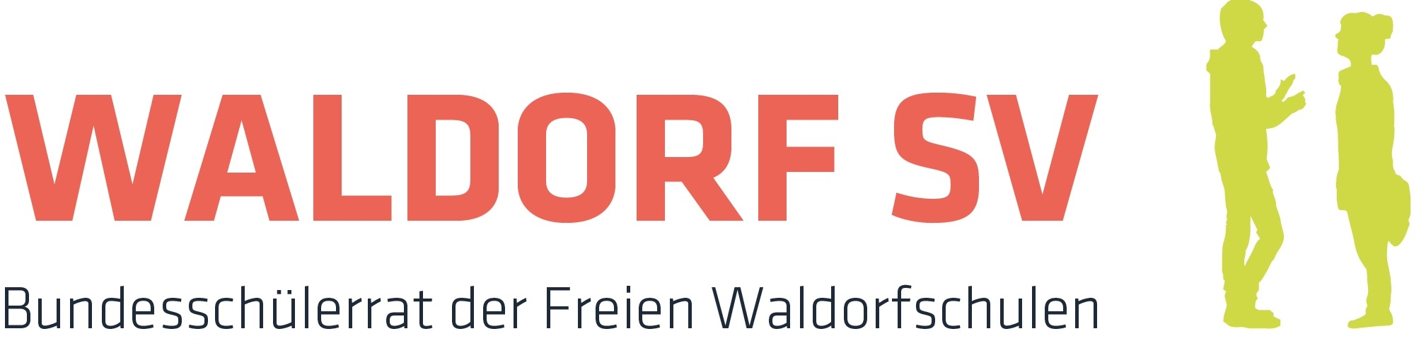 Das Logo der WaldorfSV seit August 2015